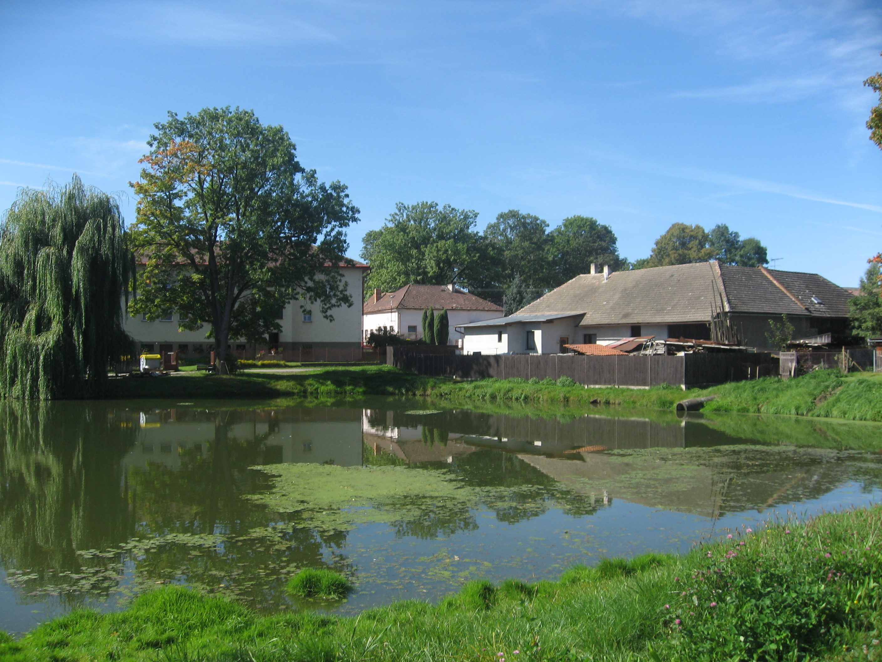 Budíkov, rybník